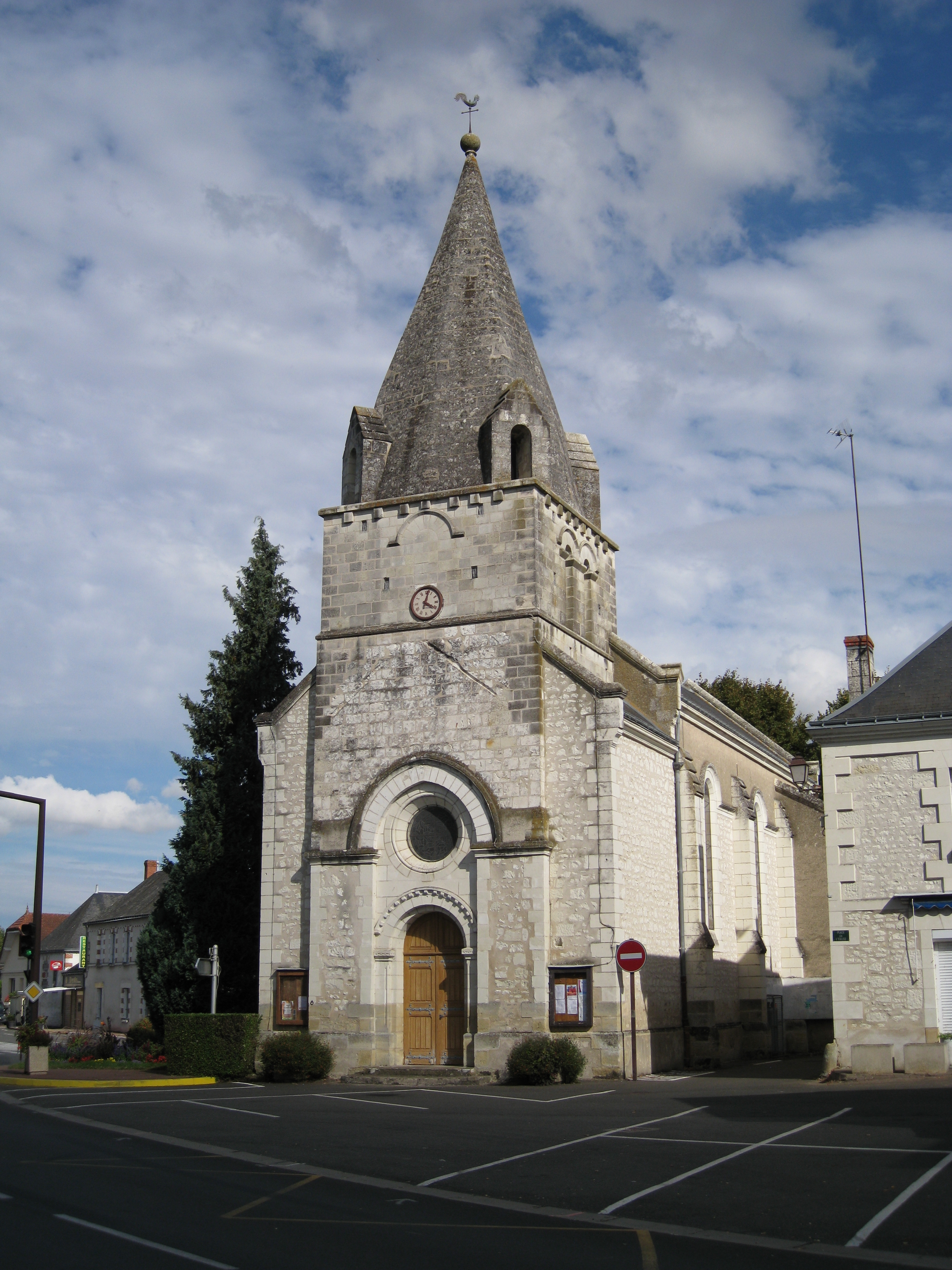 Eglise Notre-Dame de Pouzay